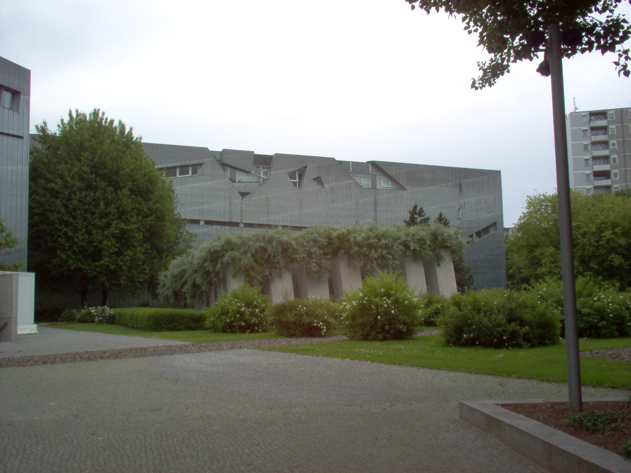 Jewish Museum Berlin - Garten des Exils